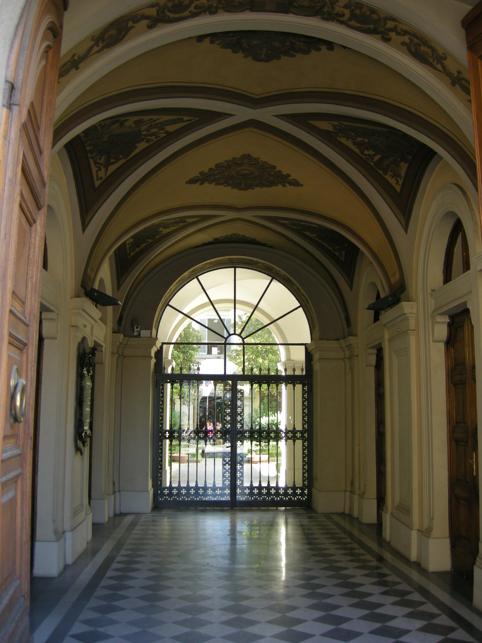 Ex convento di Santa Caterina, atrio